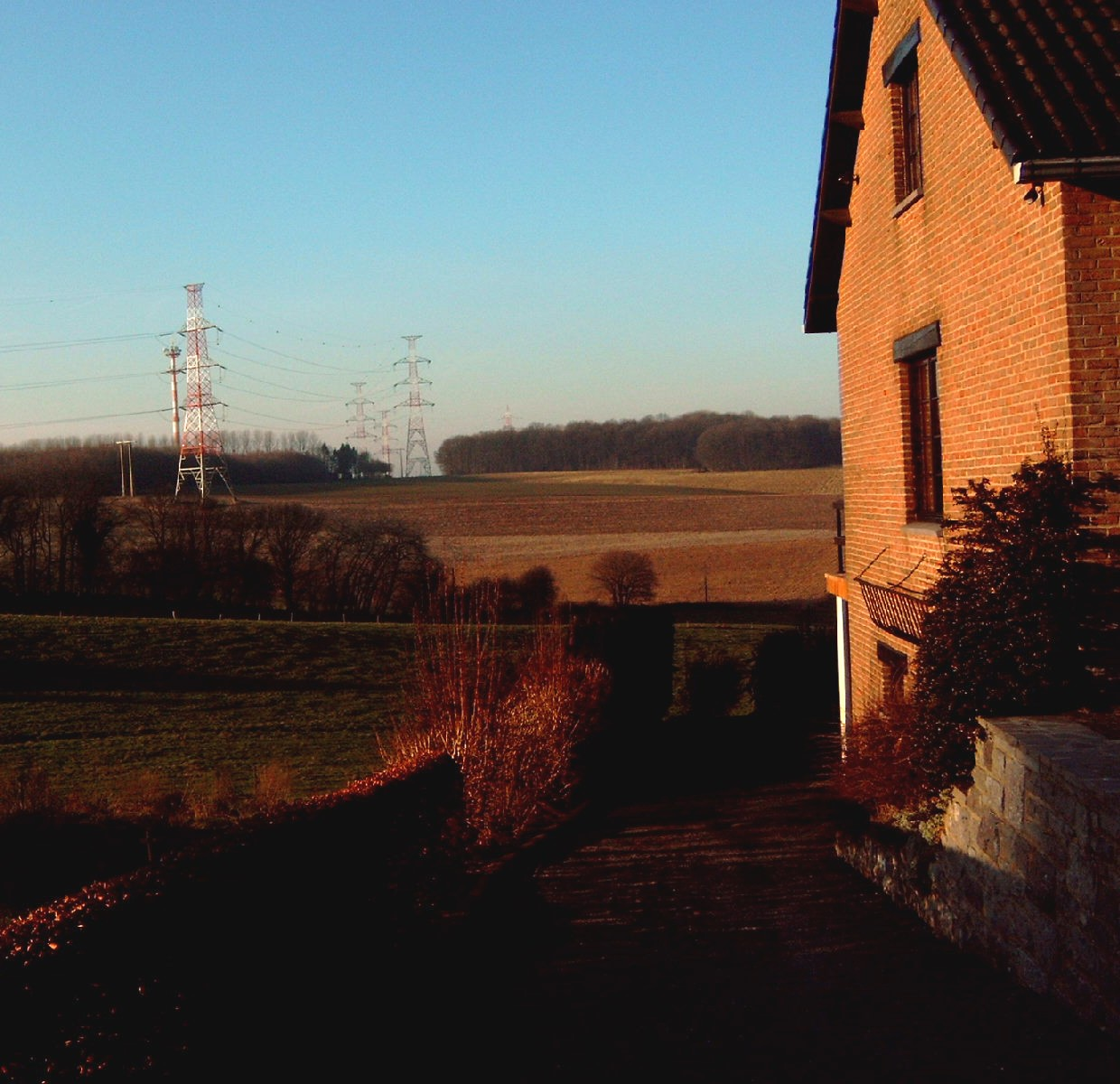 Horizonvervuiling in een vallei juist ten noorden van Namen.